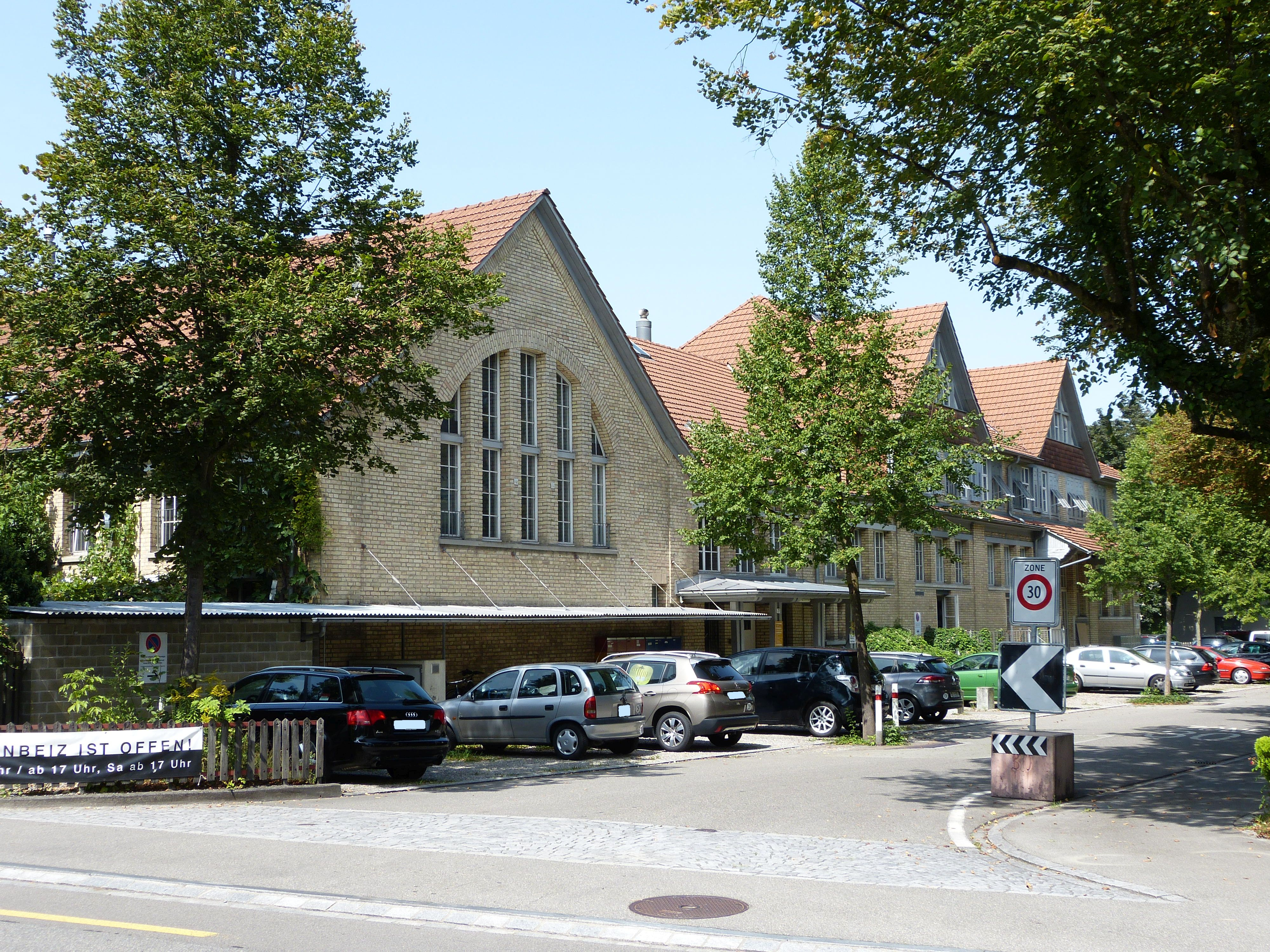 Eisenwerk